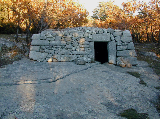 Aiguier au lieudit Travignon à Saint-Saturnin-les-Apt (Vaucluse). Photo de Jean-Marc Rosier.